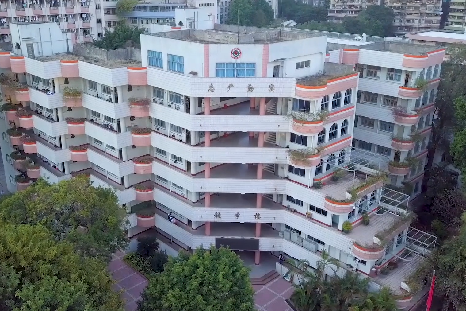 中文（香港）: 廣州市第二十一中學教學樓